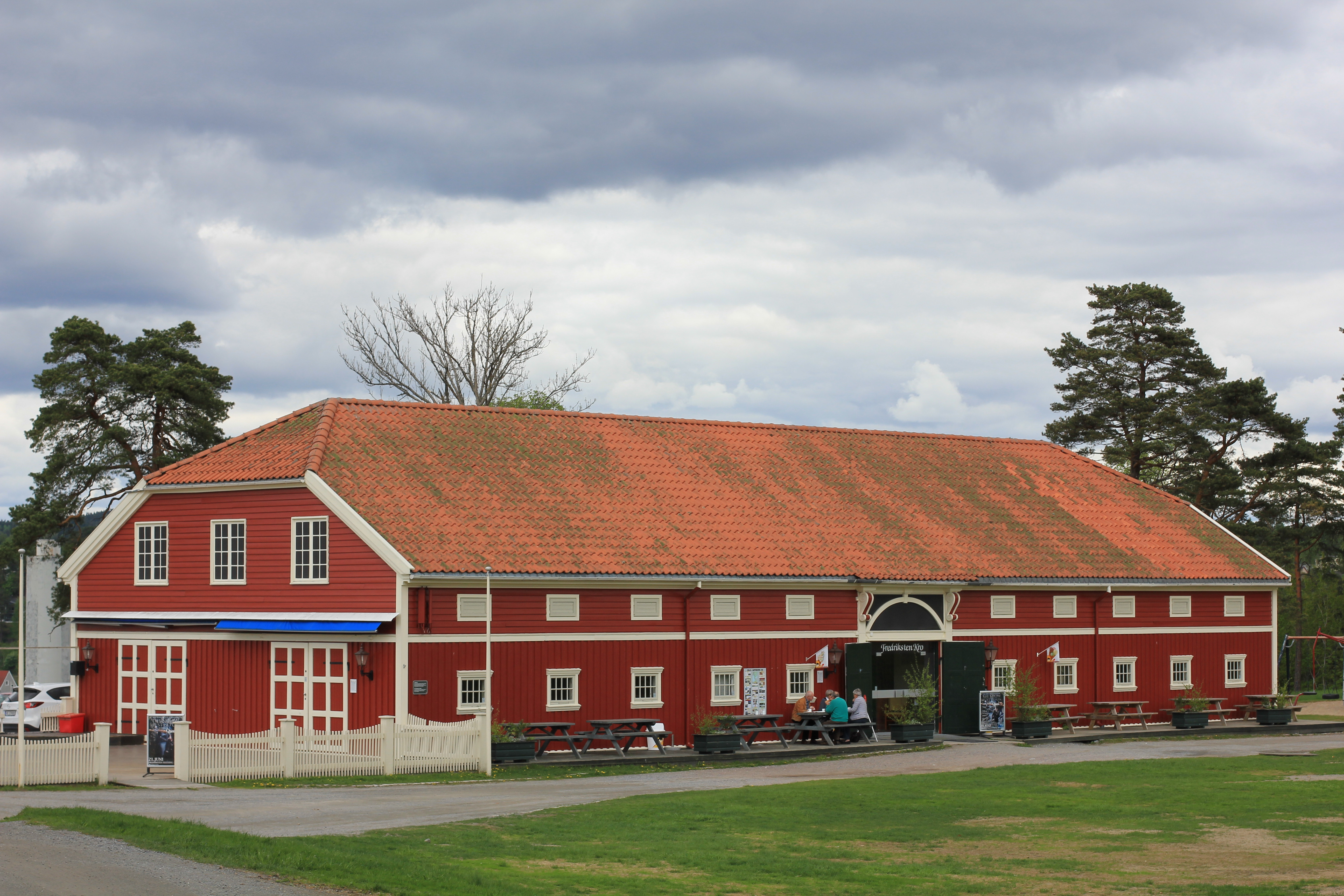 Fredriksten kro.